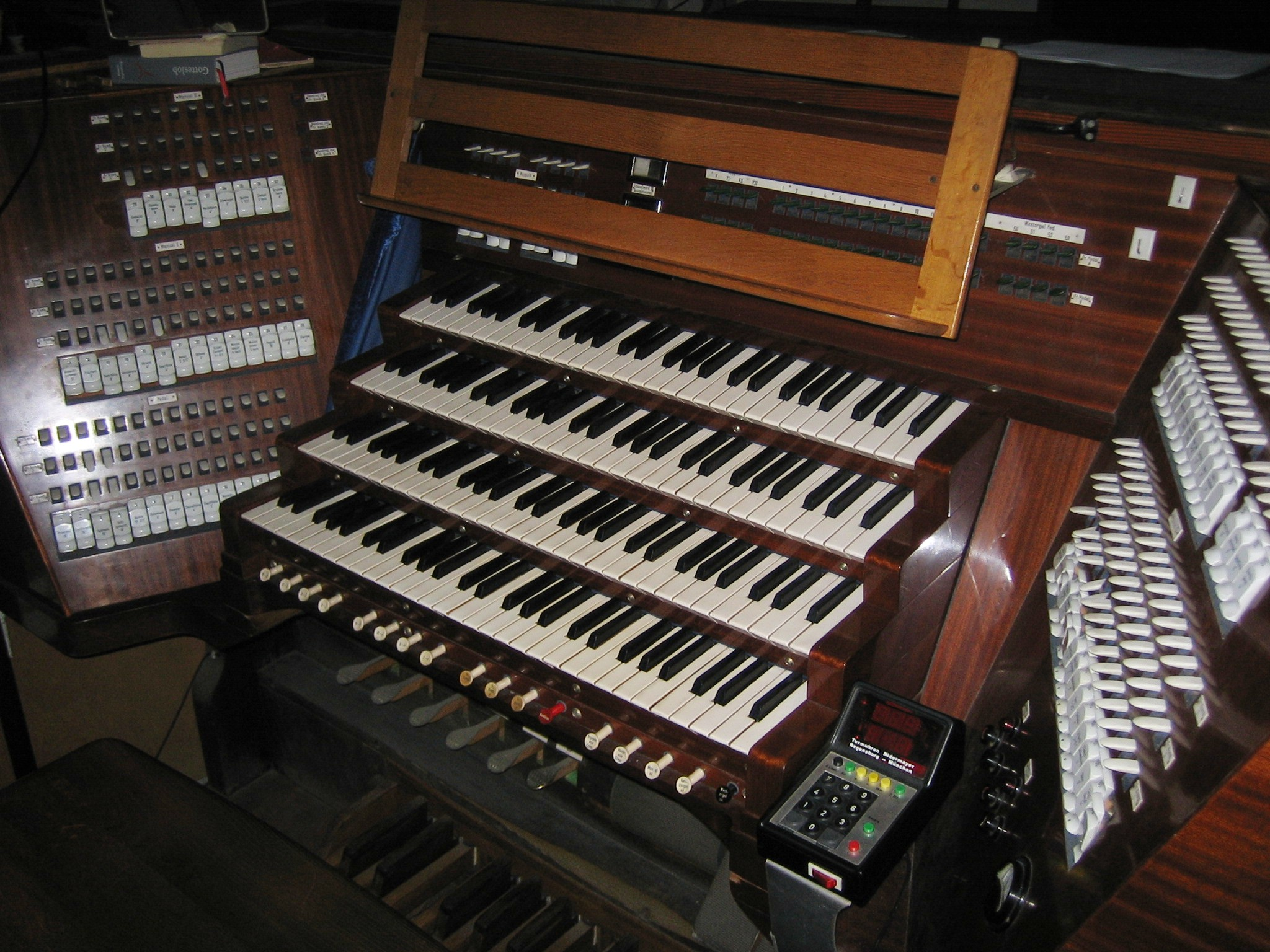 Spieltisch der Orgel von St. Emmeram in Regensburg, erbaut von Eduard Hirnschrodt